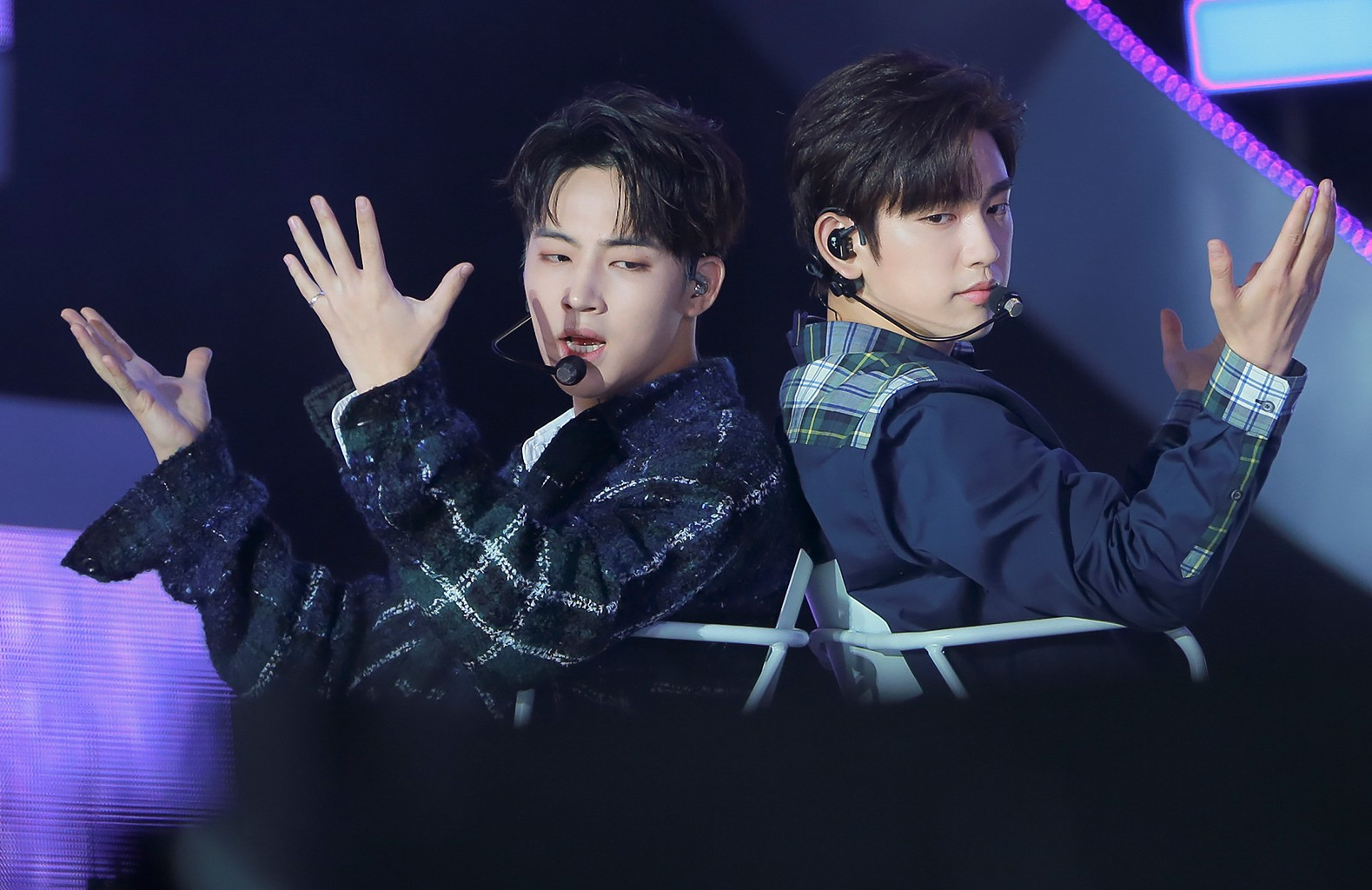 한국어 (조선): 170924 대전SF페스티벌